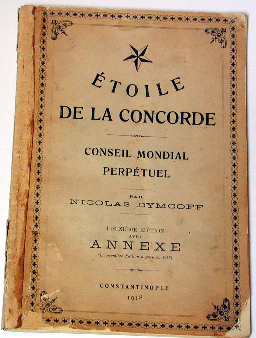 Корица на второто издание на "Etoile de la Concorde" ("Звезда на съгласието") на Никола Димков.